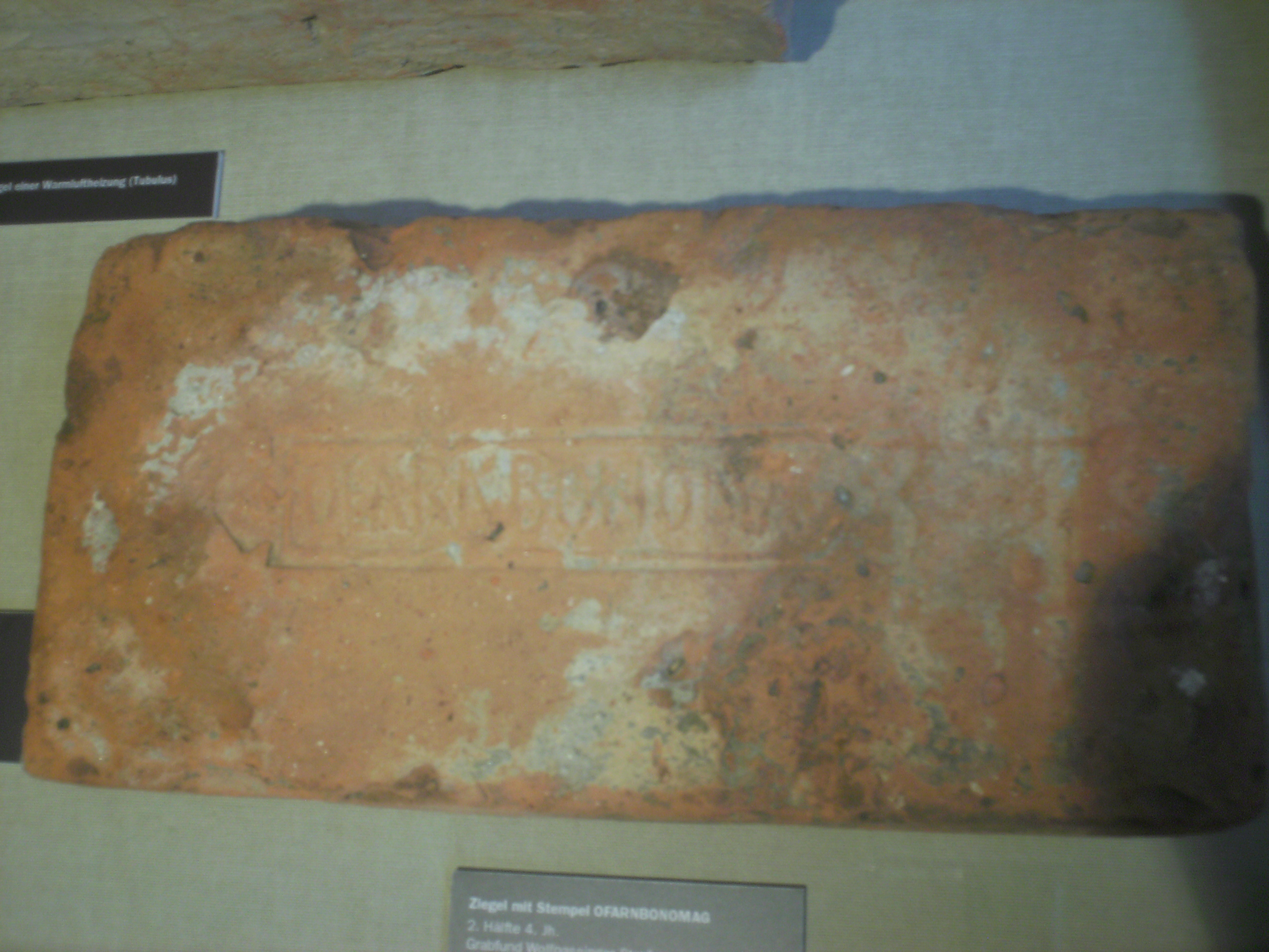 Ziegelstempel OFARNBONOMAG = OF(ficinia) A(uxiliares) R(ipenses) N(orica) BONO MAG(ister), spätes 4. Jahrhundert, Kastell Cannabiaca, Österreich. Ausstellungsstück im Schauraum des Gemeindeamtes Zeiselmauer-Wolfpassing, entgeltfrei zugänglich.